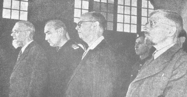 Obtoženci na rupnikovem procesu. Od leve: Leon Rupnik, Erwin Rösener, Milko Vizjak in Lovro Hacin.